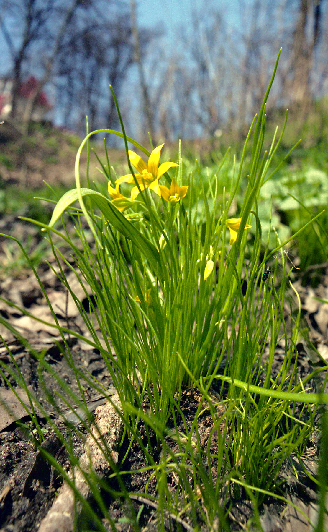 Gagea minima, Ukraine, Kiev, Khreshchaty park